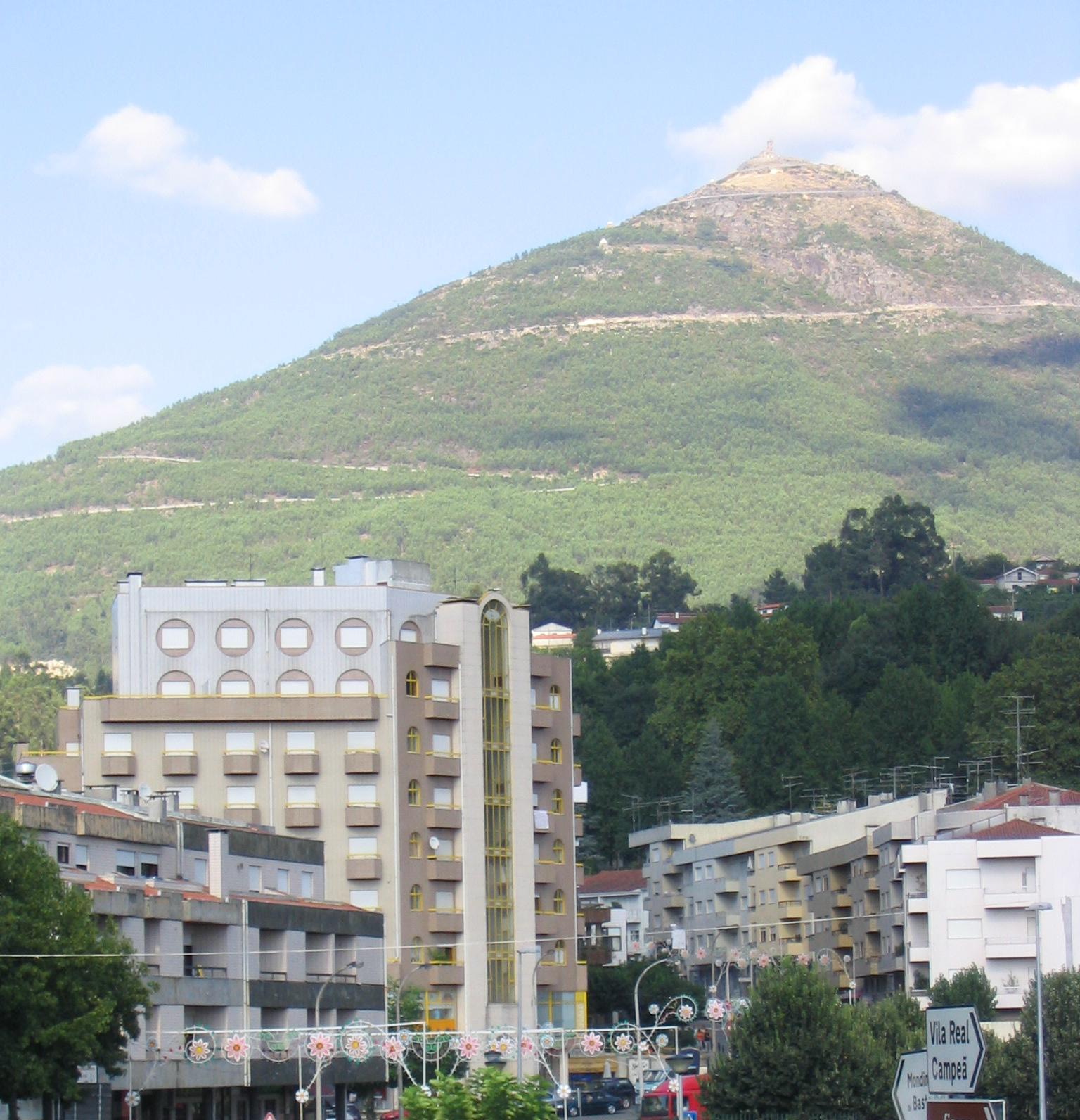 Mondim de Basto, vista de la Iglesia de Nuestra Señora de Graça (Portugal)